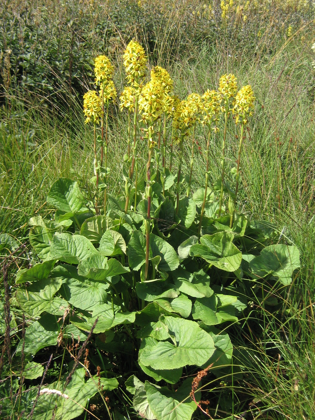 Ligulaire de Sibérie (Ligularia sibirica) au lac de Souveyrols (Monts d'Aubrac, Massif central, France)